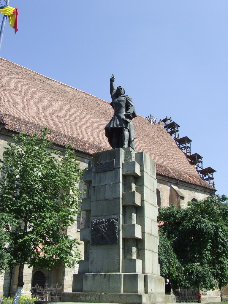 Andrei Mureşanu statue in Bistriţa city, Bistriţa-Năsăud County, Romania